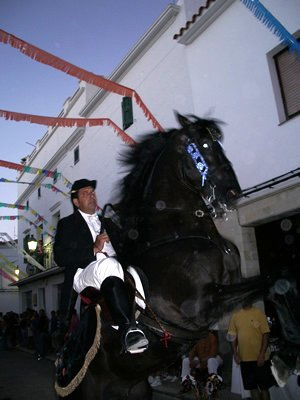 Es jaleo